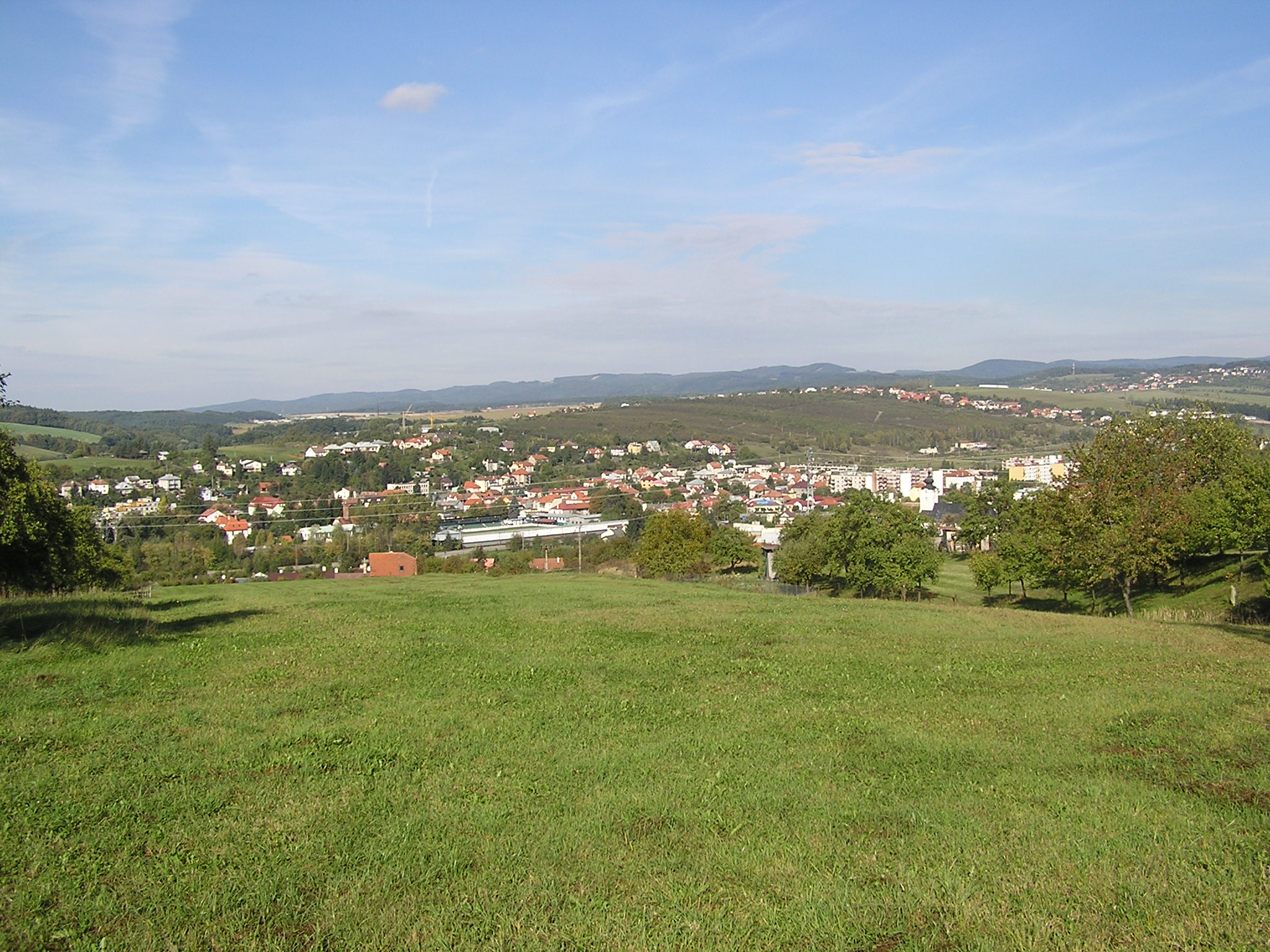 Slušovice, pohled z kopce